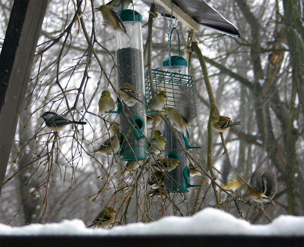 Busy bridfeeders in winterBirds